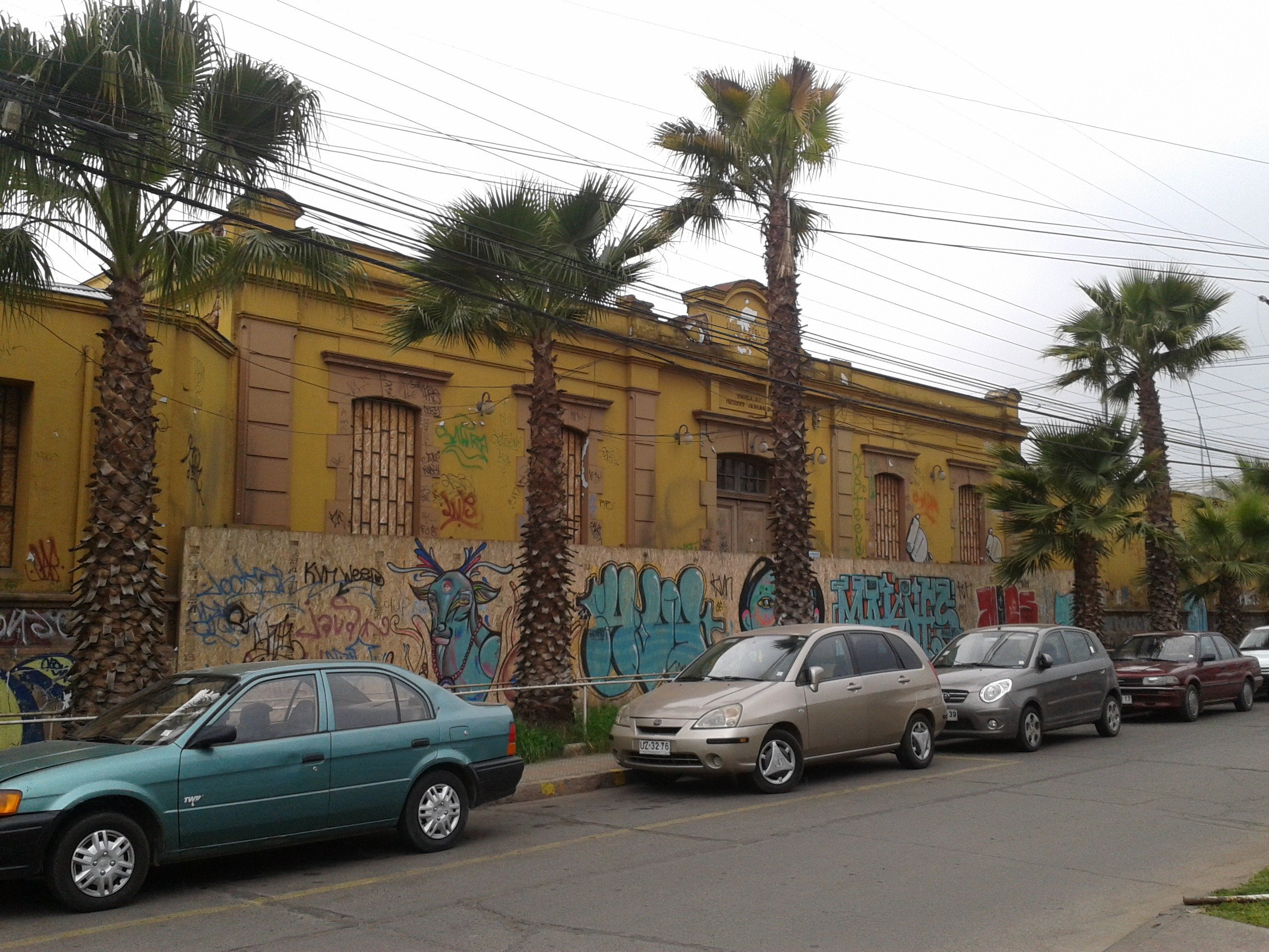 Escuela D-2 Presidente José Manuel Balmaceda This is a photo of a national monument in Chile: 1856